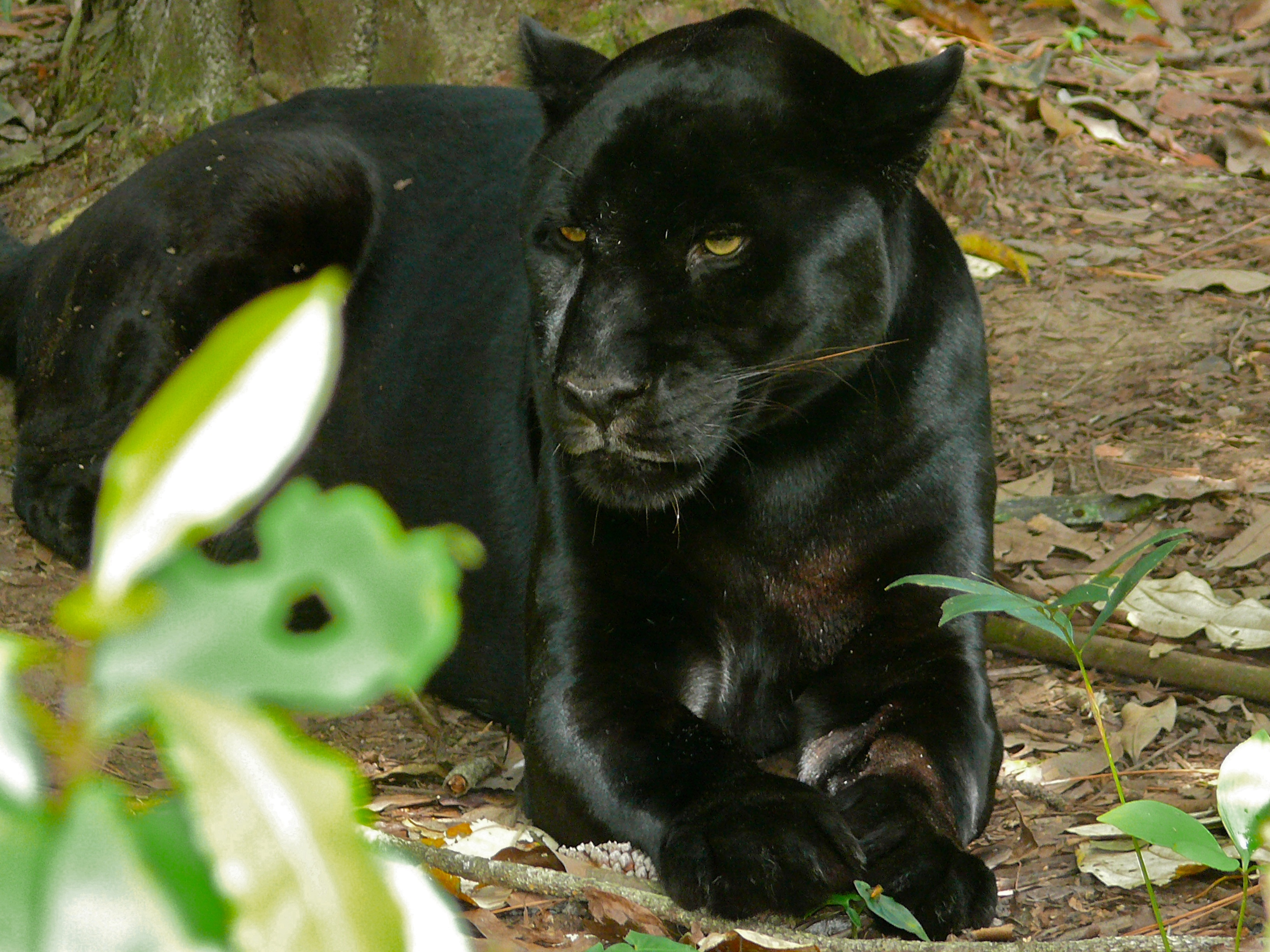 Belize Zoo, BELIZE